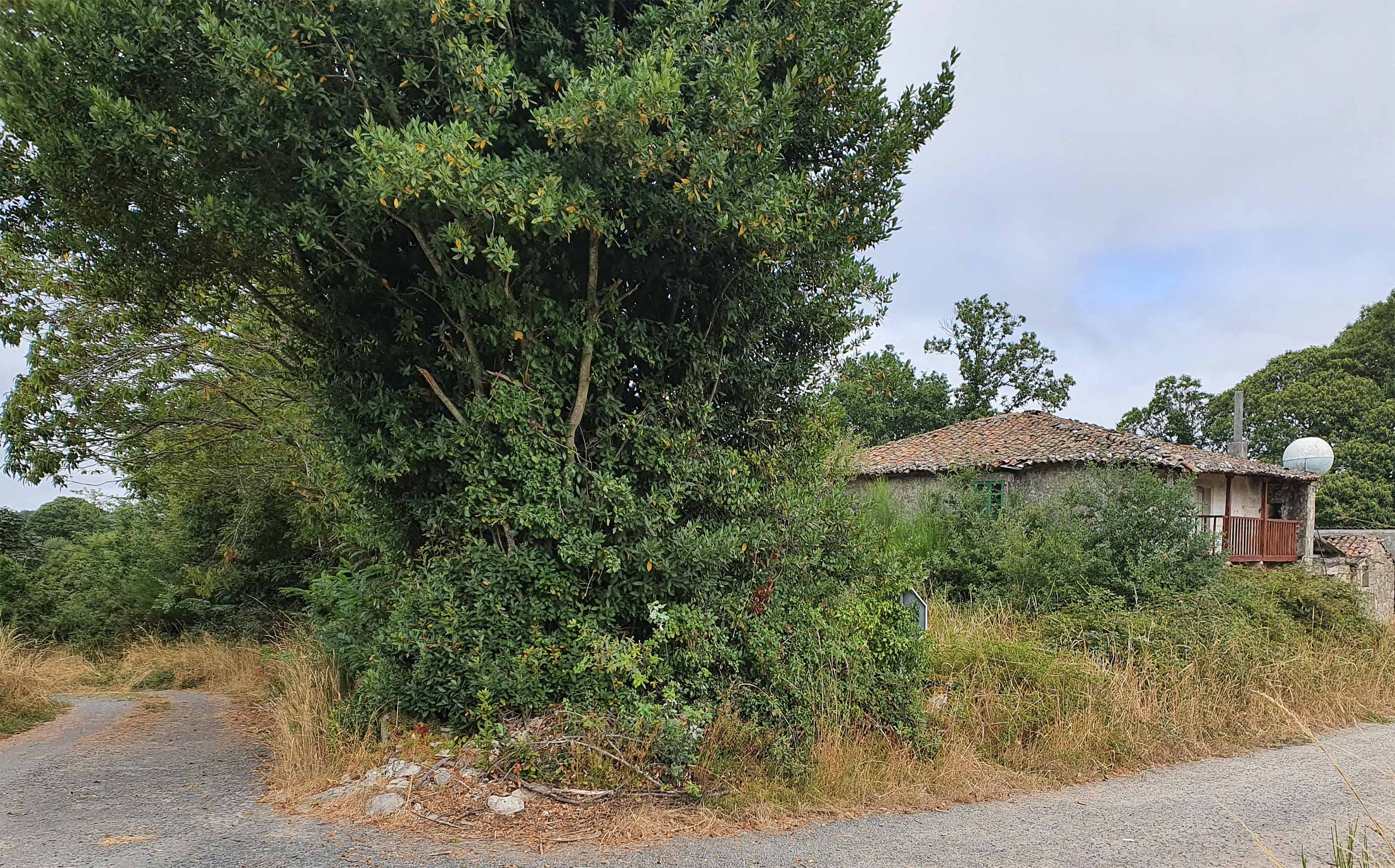 Lugar de Campo de Chao, na parroquia de San Mamede de Agüela do Concello de Antas de Ulla. Unha soa vivenda, que está deshabitada.